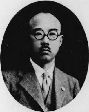 夏堀悌二郎